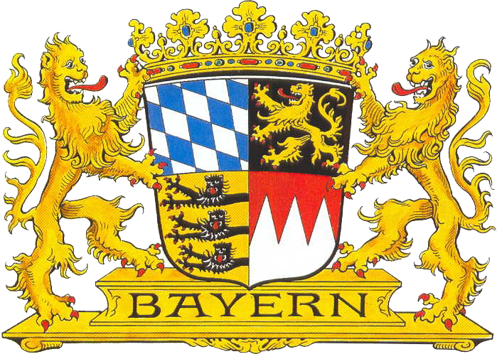 Entworfen von Prof. Otto Hupp. Angenommen durch den bayerischen Landtag 1923.